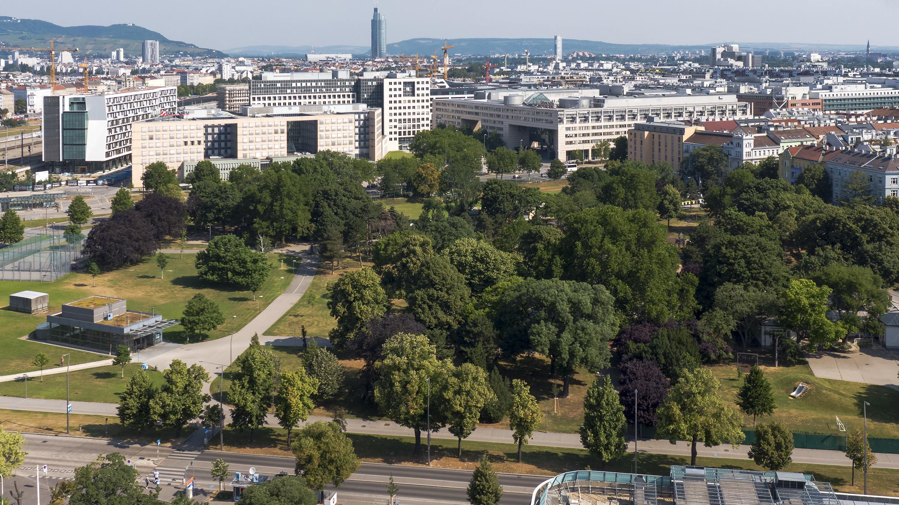 Park Venediger Au in Wien 2